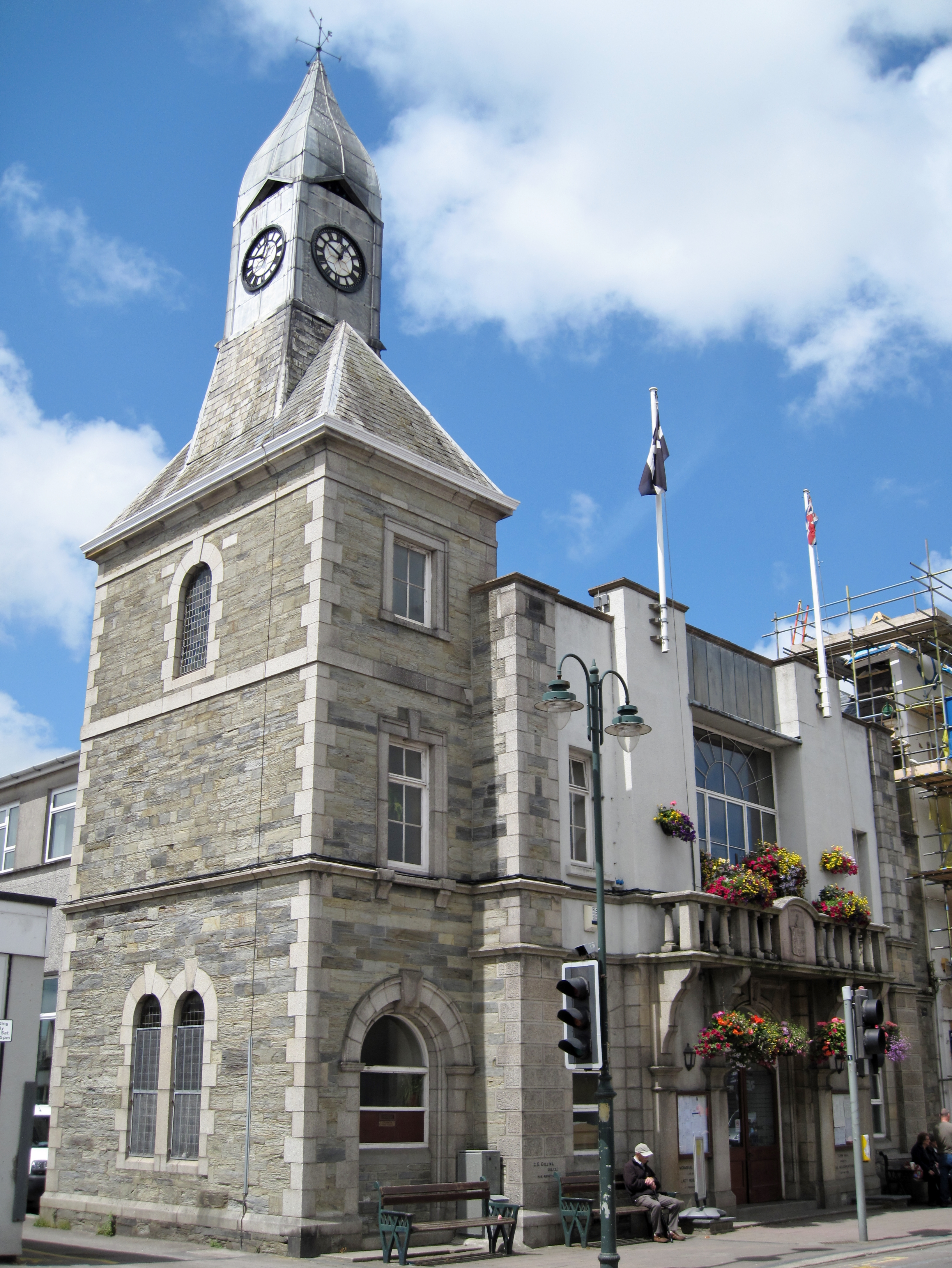 Town Hall (Rathaus) von Wadebridge, Cornwall, Großbritannien